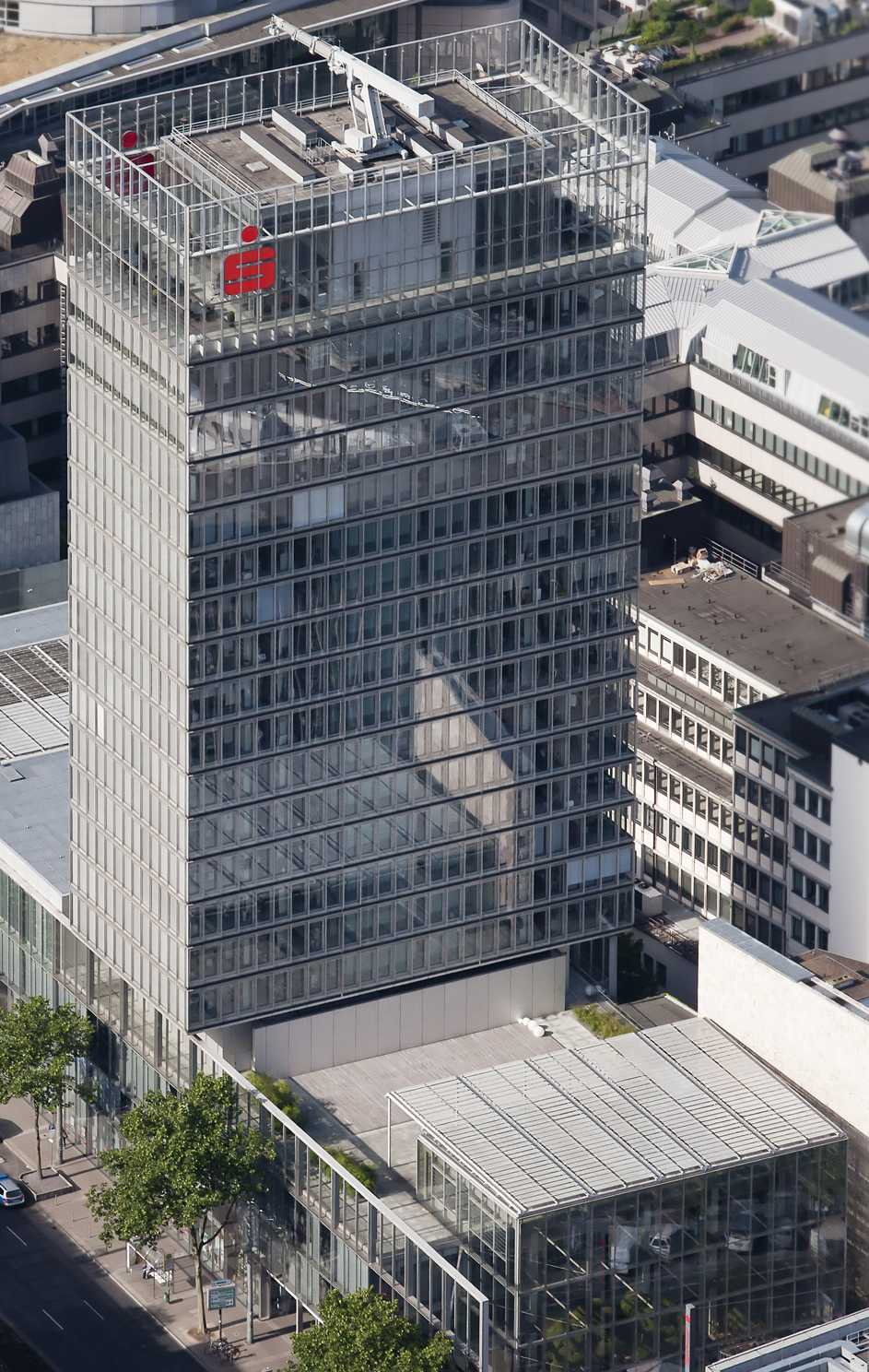 Zentrale der Stadtsparkasse Düsseldorf 2011